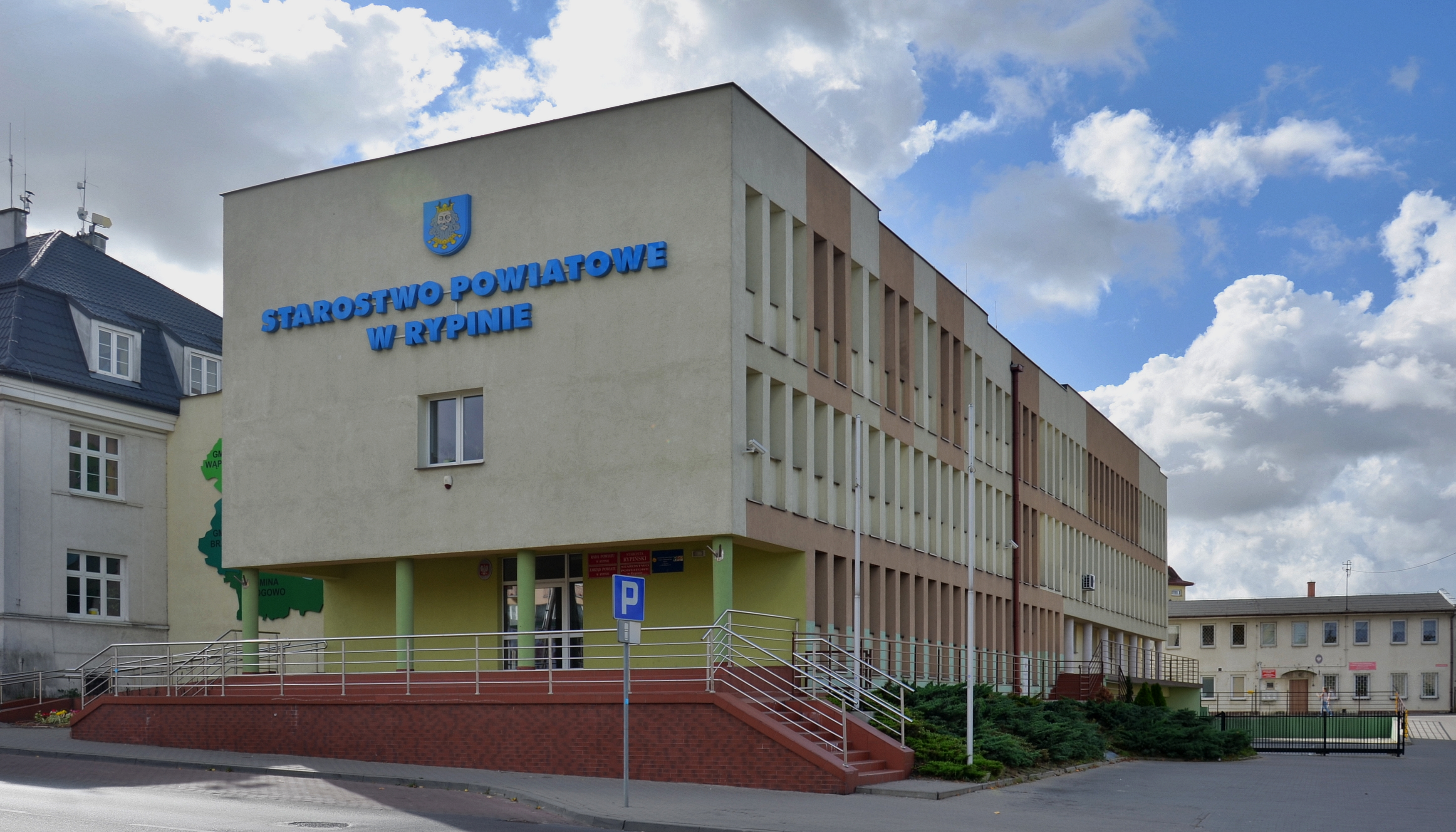 Starostwo Powiatowe w Rypinie